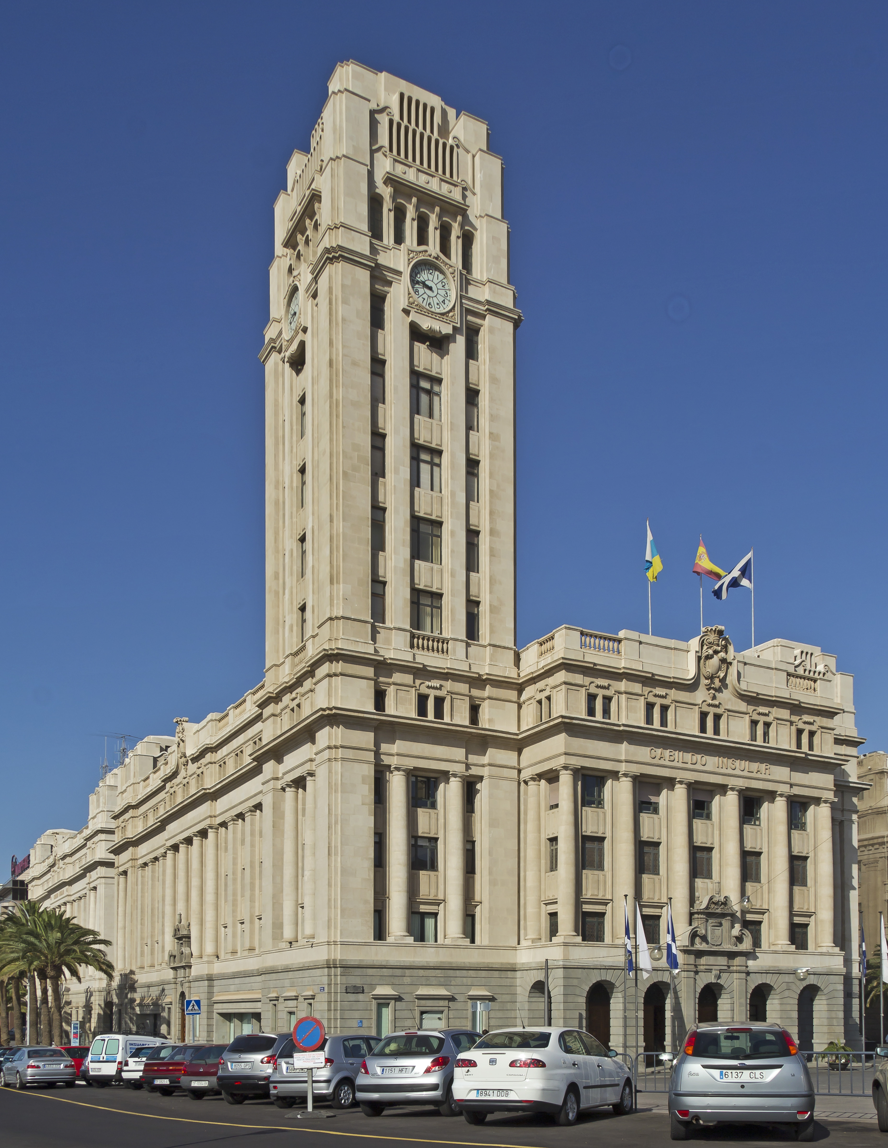 Cabildo Insular de Tenerife in Santa Cruz de Tenerife, Blick von Nordosten